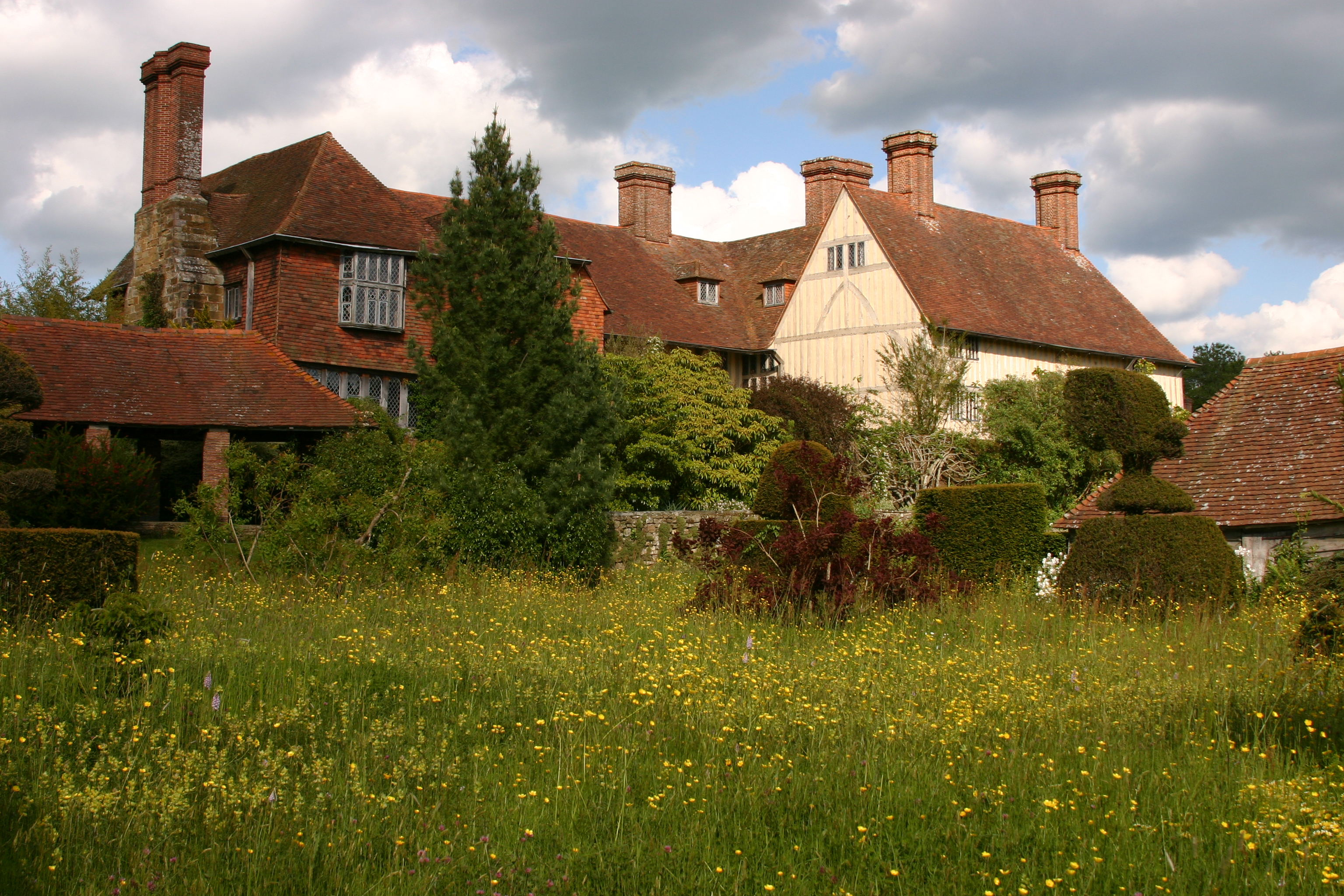 Great_Dixter_House_&_Gardens